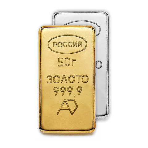 Фото готовой продукции Новосибирского аффинажного завода